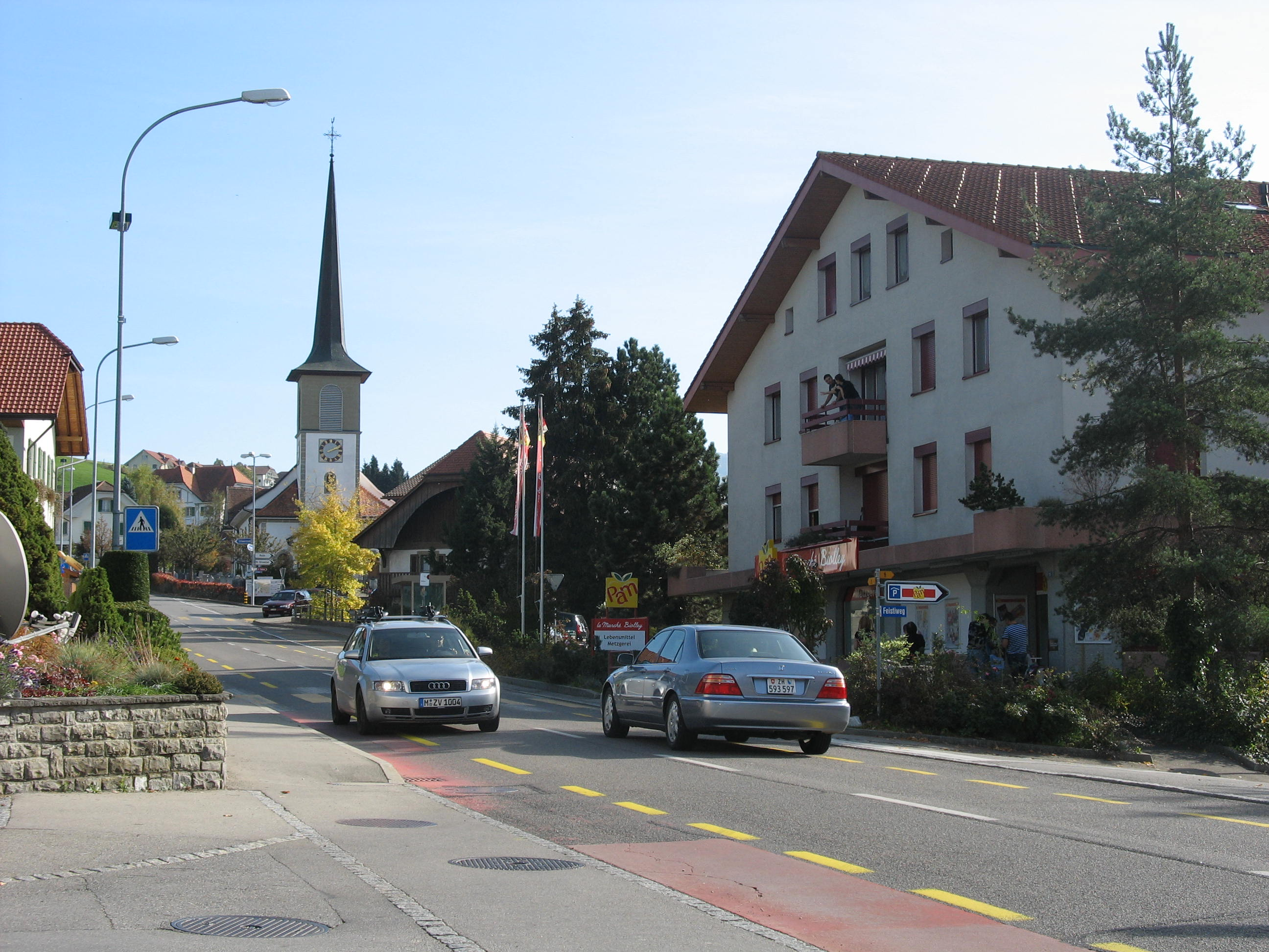 Dorfzentrum von Giffers, Kanton Freiburg